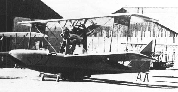 CAMS 30E 1923